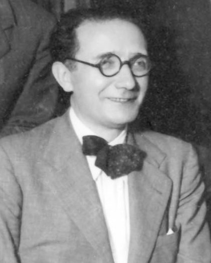 Castelao en Montevideo en 1940.